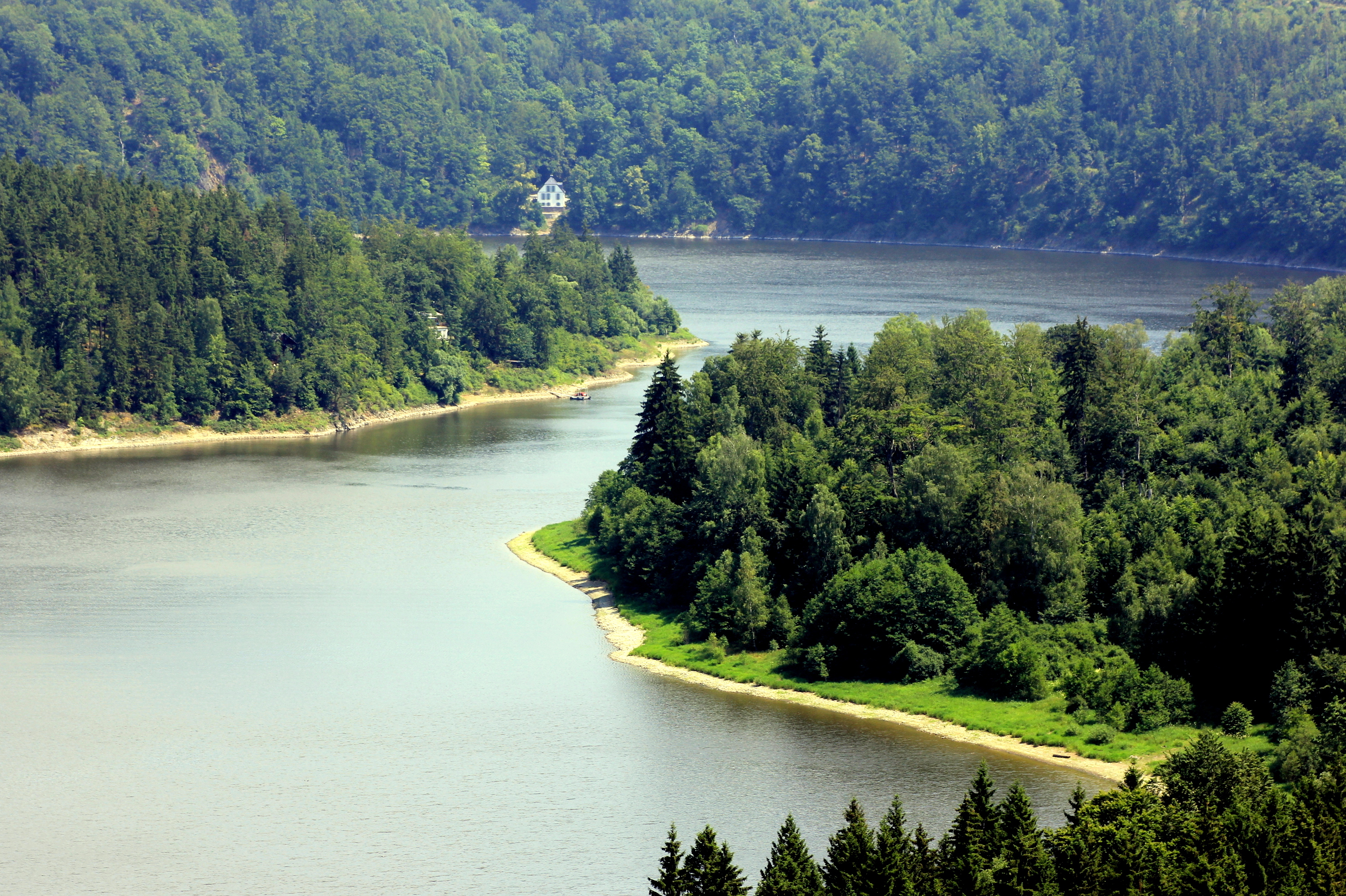 Saaleufer vom Heinrichstein mit Blick in Richtung Silberknie (Hänge an der Bleilochtalsperre)